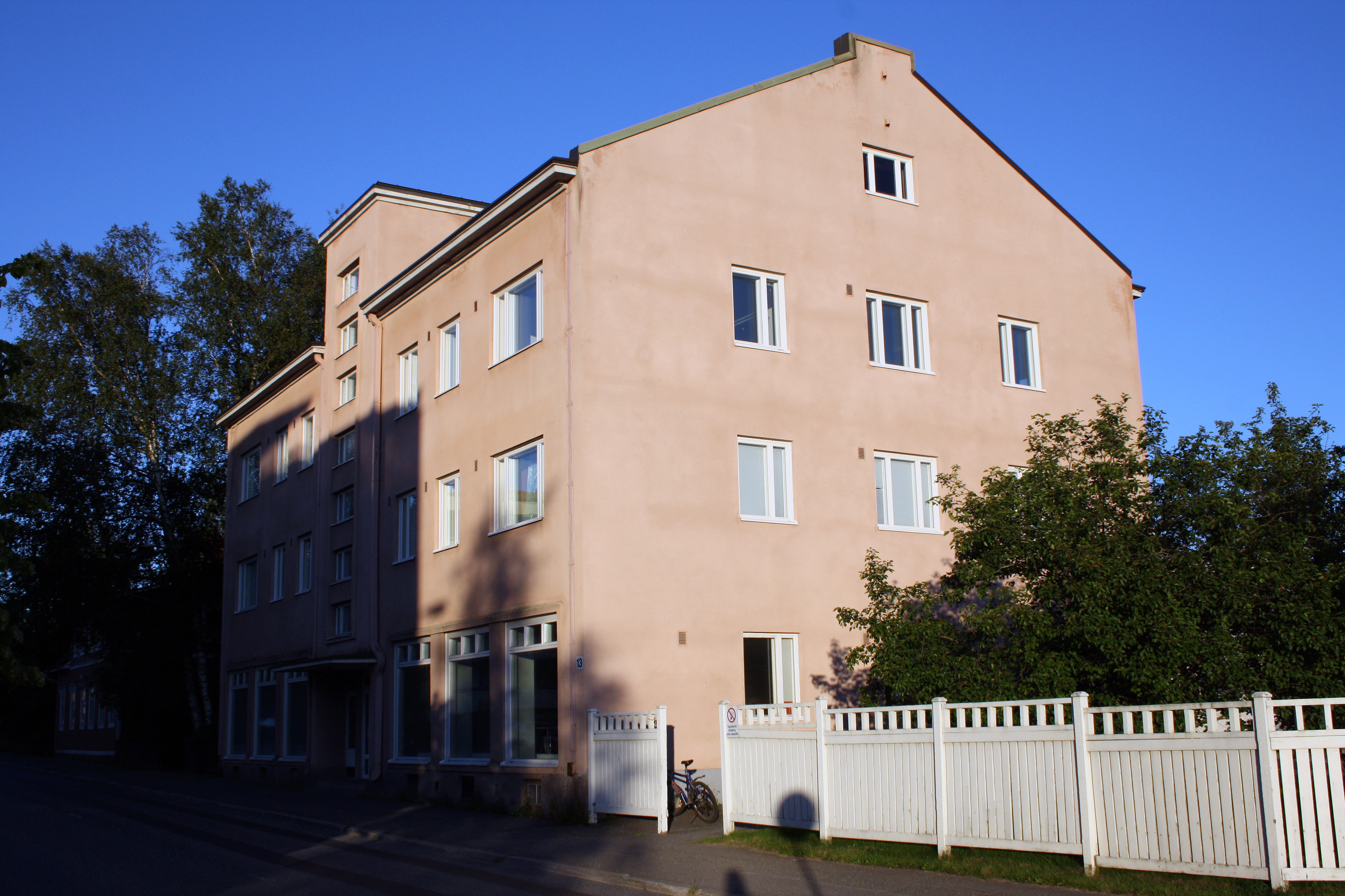 Hansan talo Kokkolassa, Suomessa.